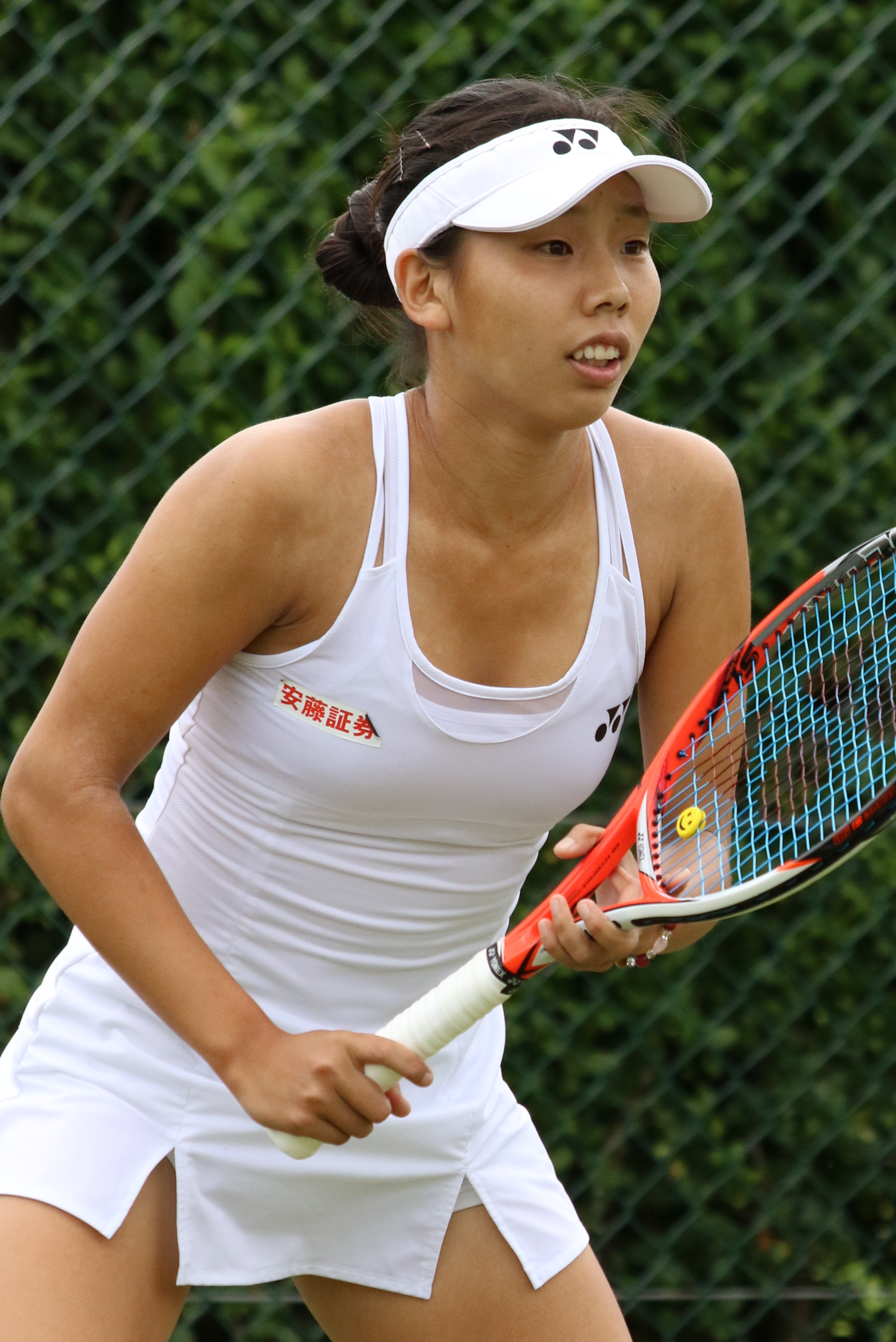 Hibi WMQ16 (3)